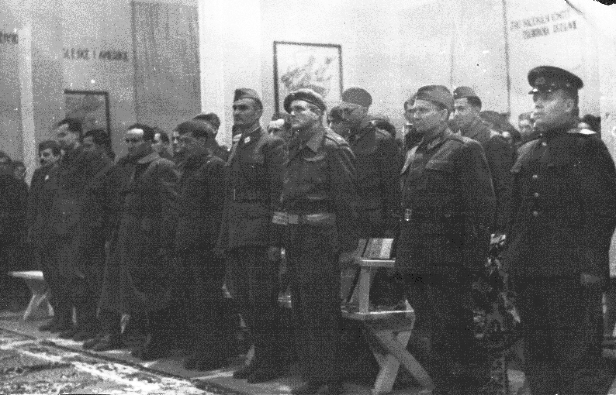 Srpski (latinica): Drugi kongres USAOJ-a u Drvaru.